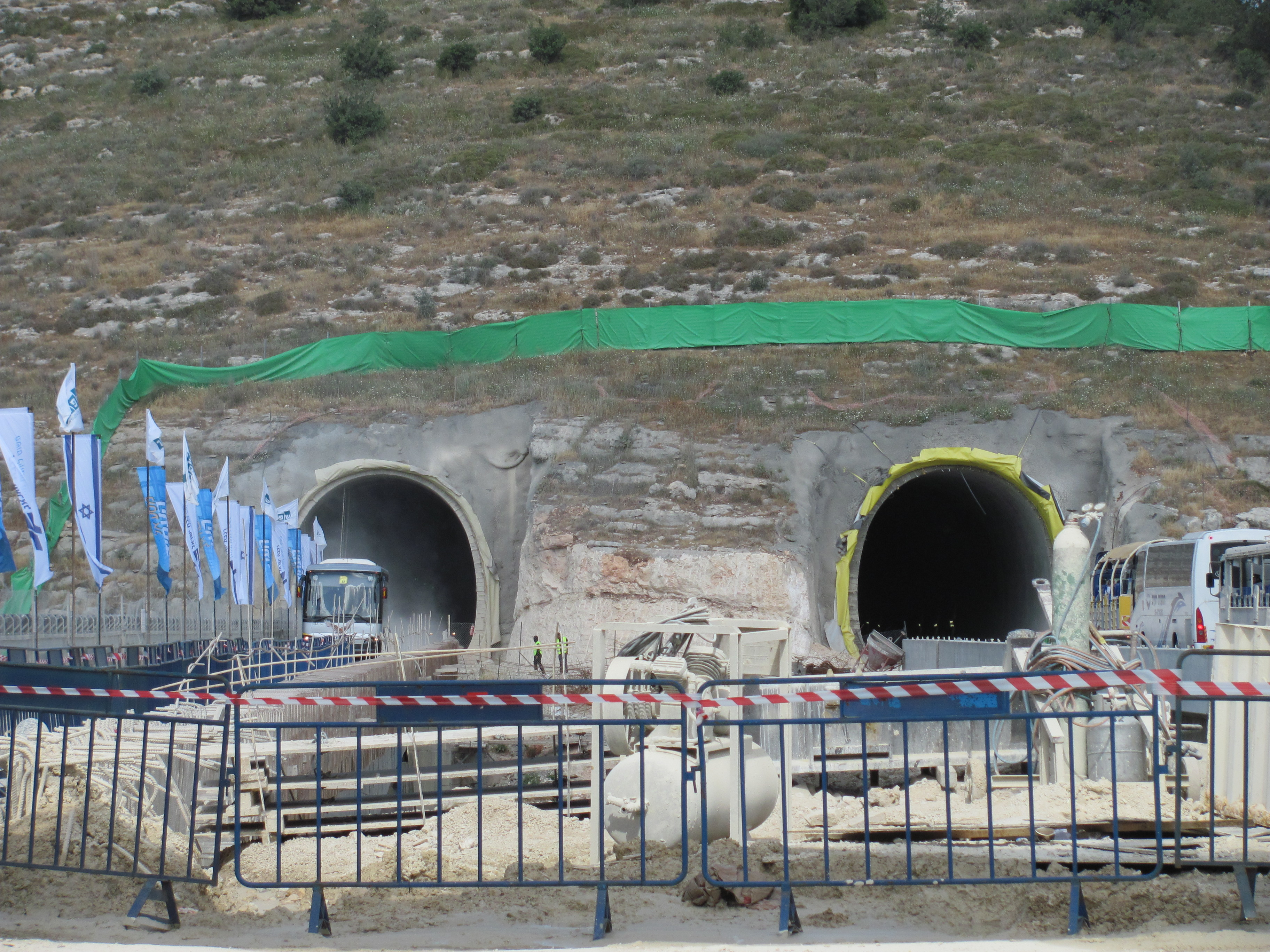 קו הרכבת המהיר לירושלים מנהרה 2 יציאה מזרחית